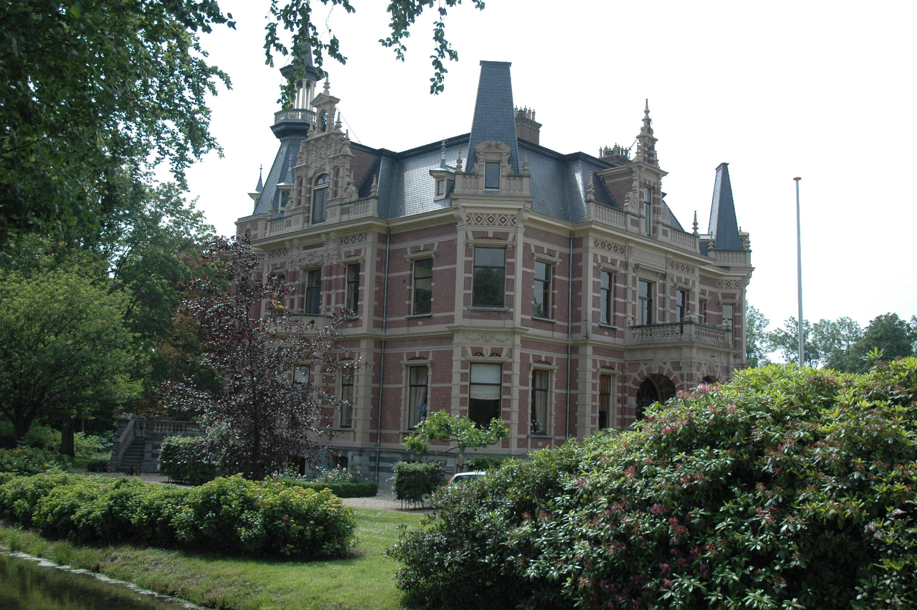 Zwaan Wijck